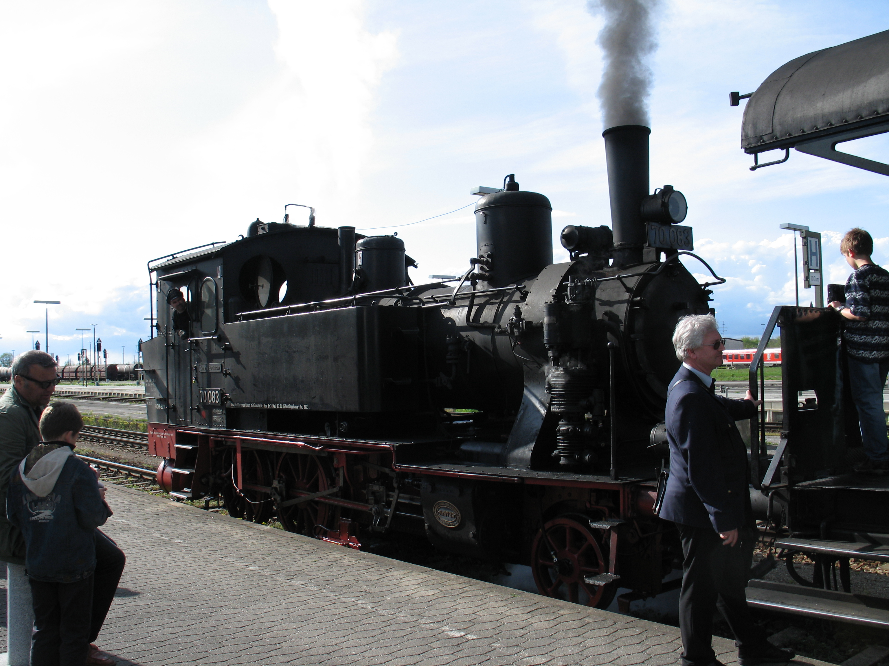 BR 70 083 (auch: Pt 2/3) am Bahnhof Mühldorf bei einer Sonderfahrt (München-Mühldorf-Altötting & zurück)